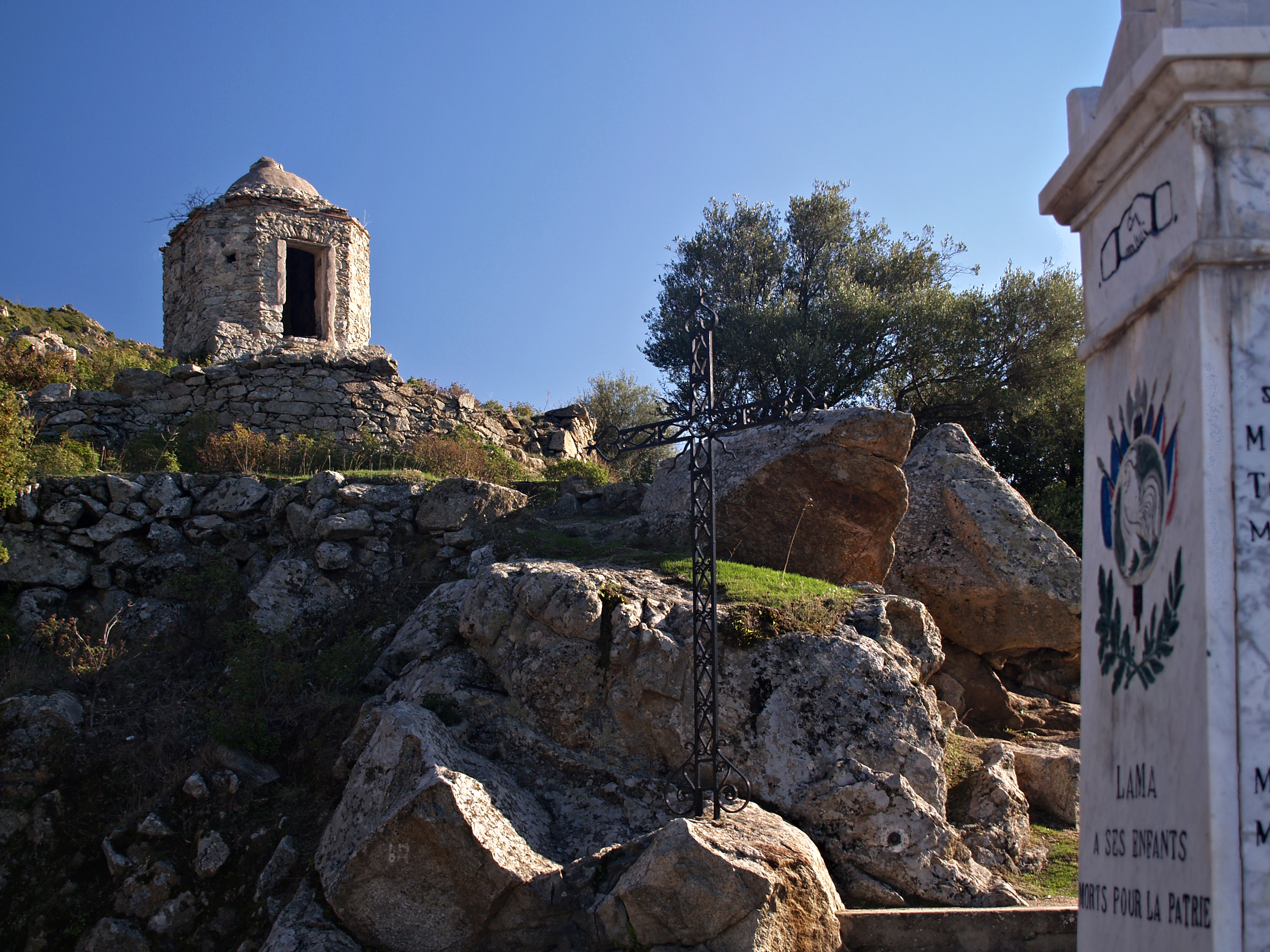 Lama (Corse) - Monument aux morts sous le village